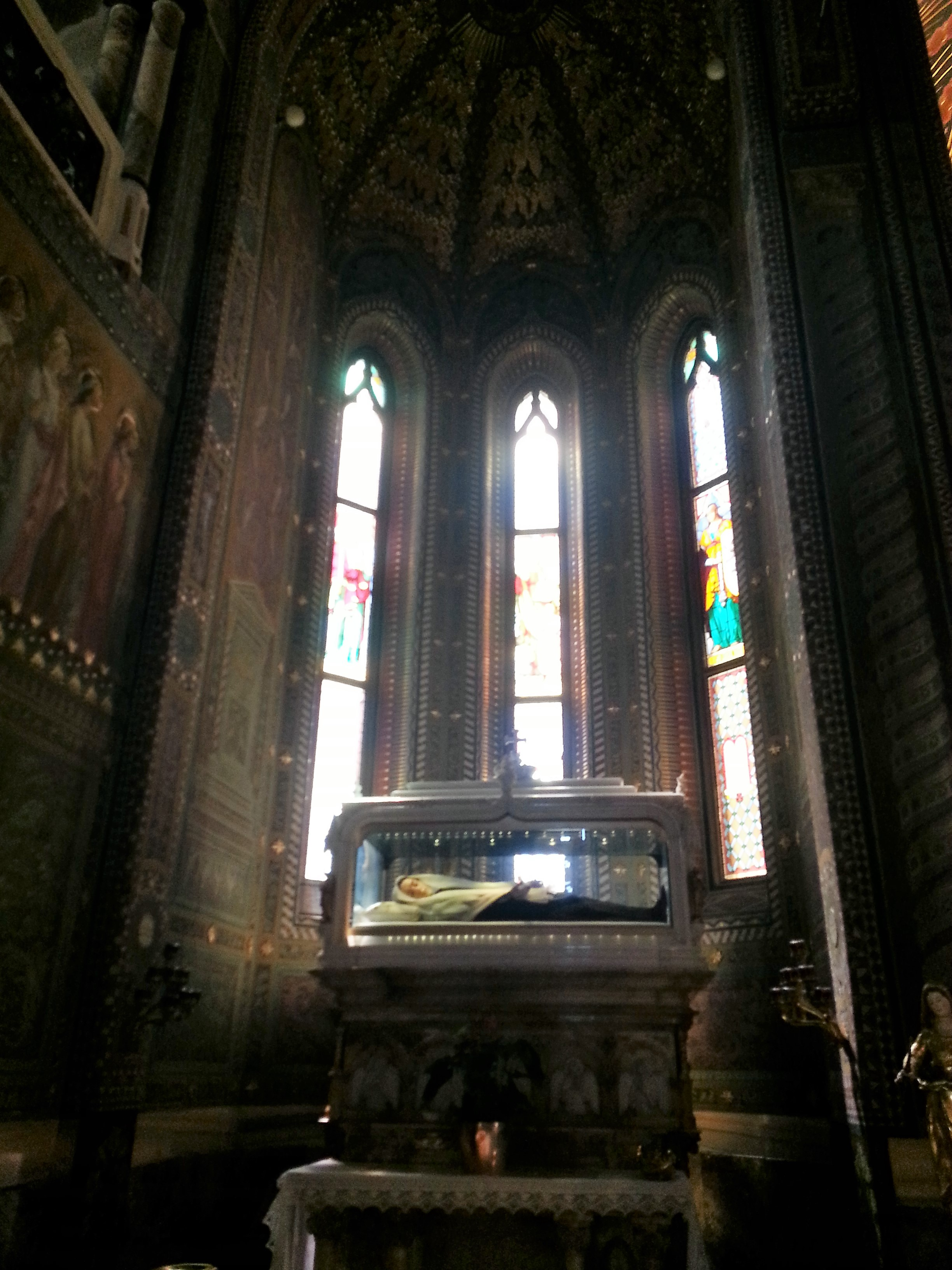 Teca della santa Vincenza Gerosa nel santuario delle sante Gerosa e Capitanio a Lovere